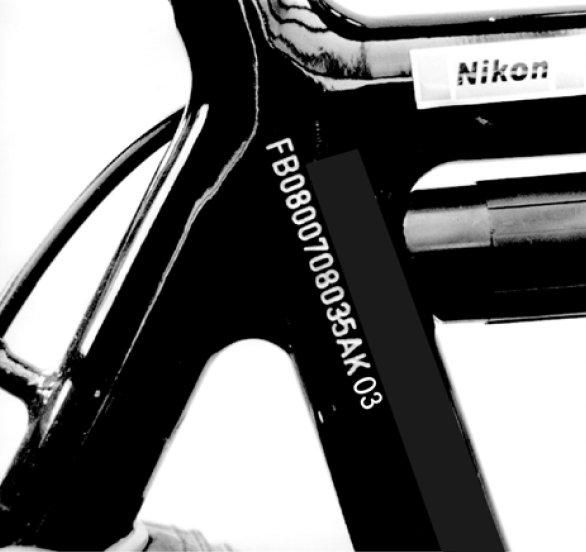 Fein-Kodierung auf Fahrradrahmen